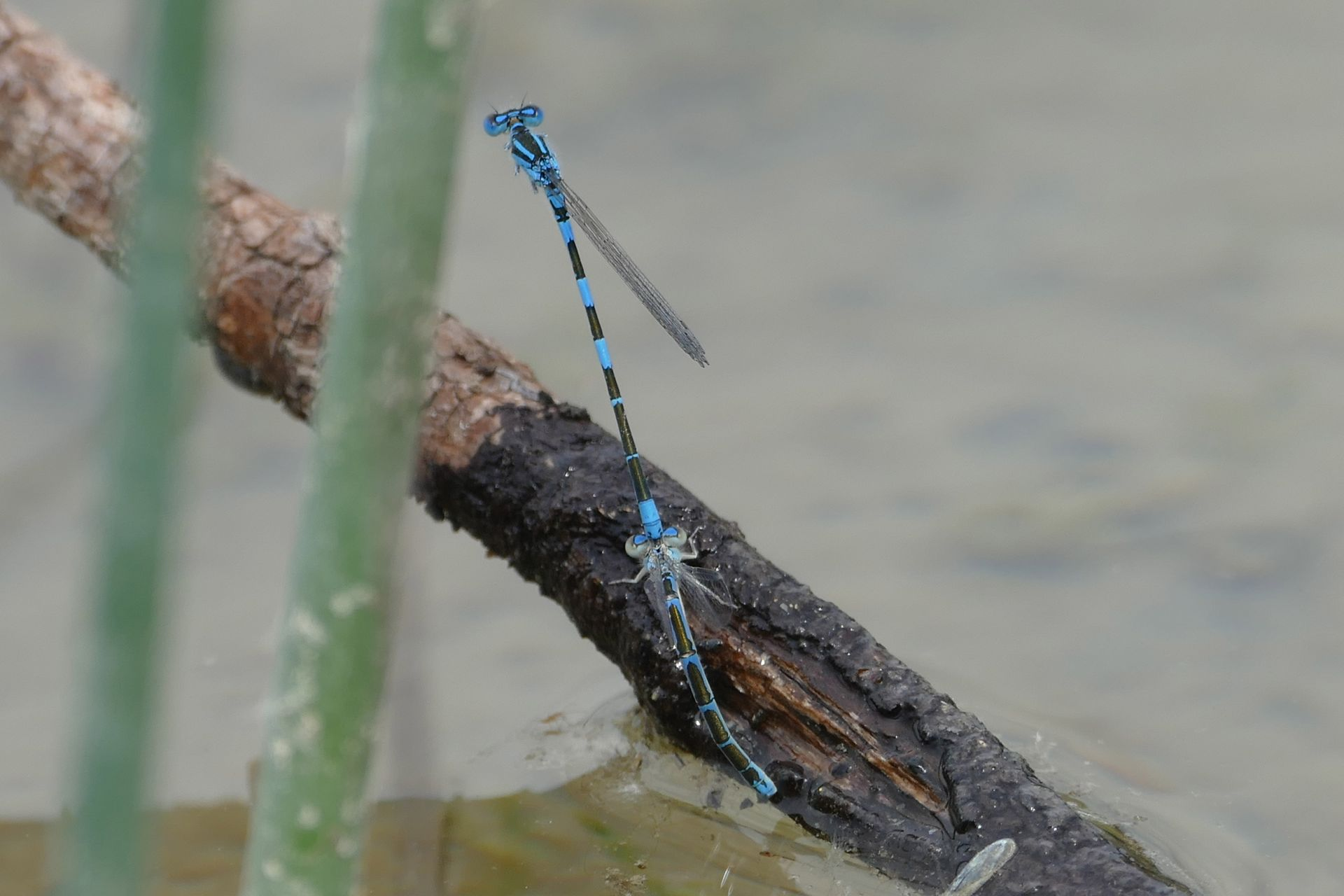 Les pontes semble avoir lieu généralement dans des végétaux morts